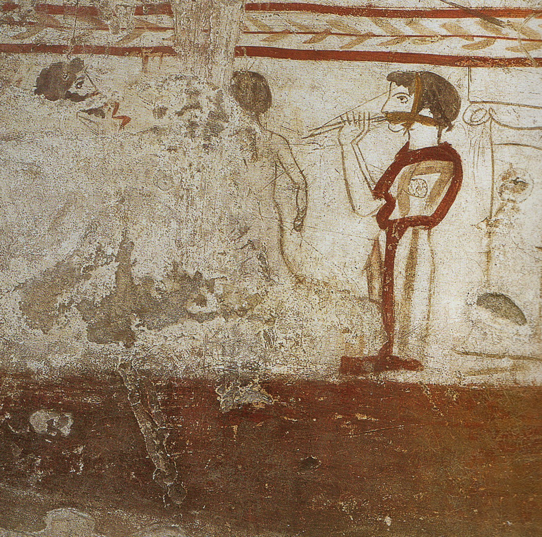 Paestum, Grab der Granatäpfel. Kämpfende, Flötenspieler und Säule. Detail einer der Längsplatten